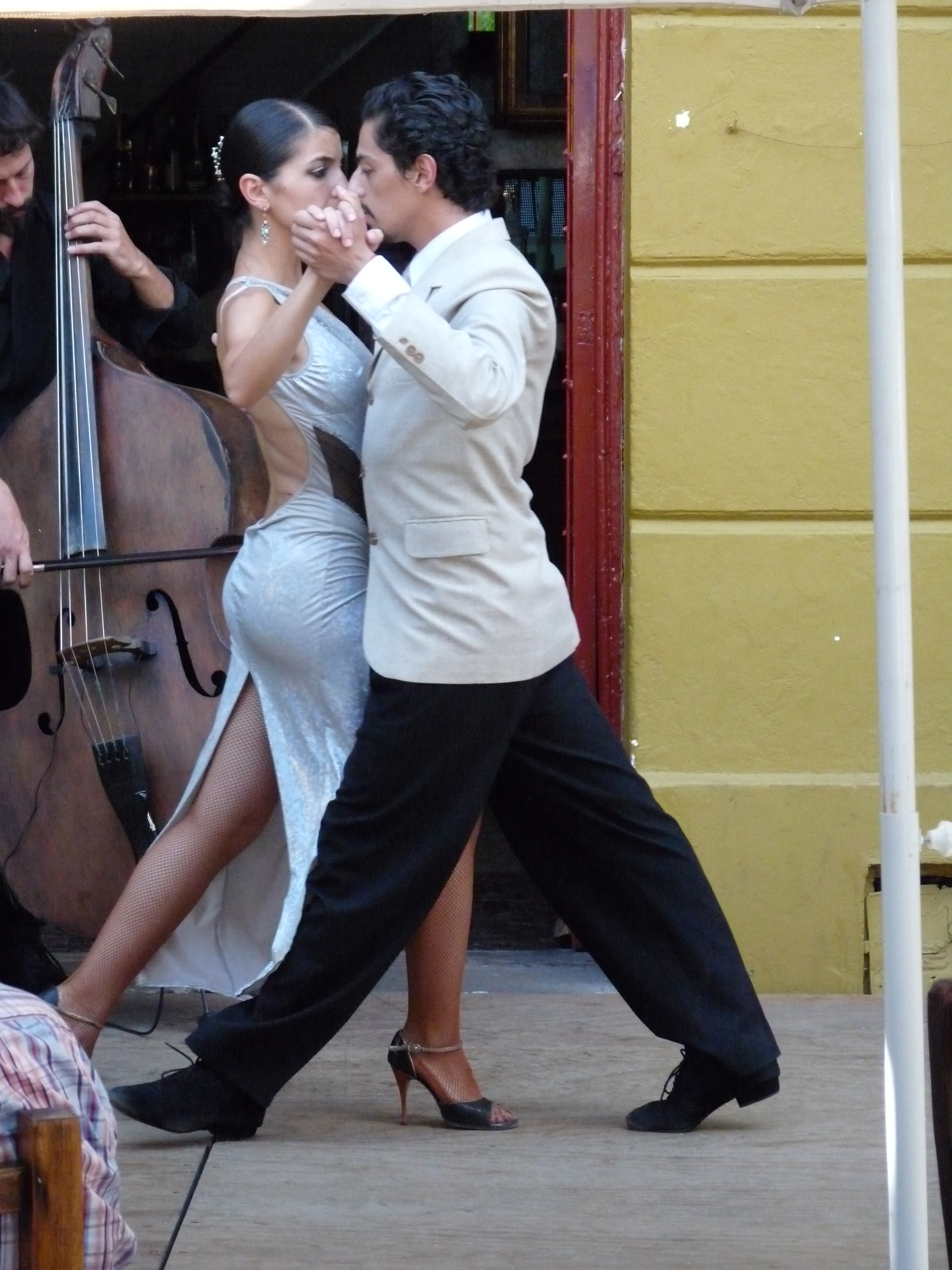 Camanita Tango 06